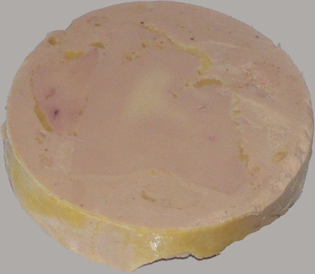 Une tranche de Foie gras de canard